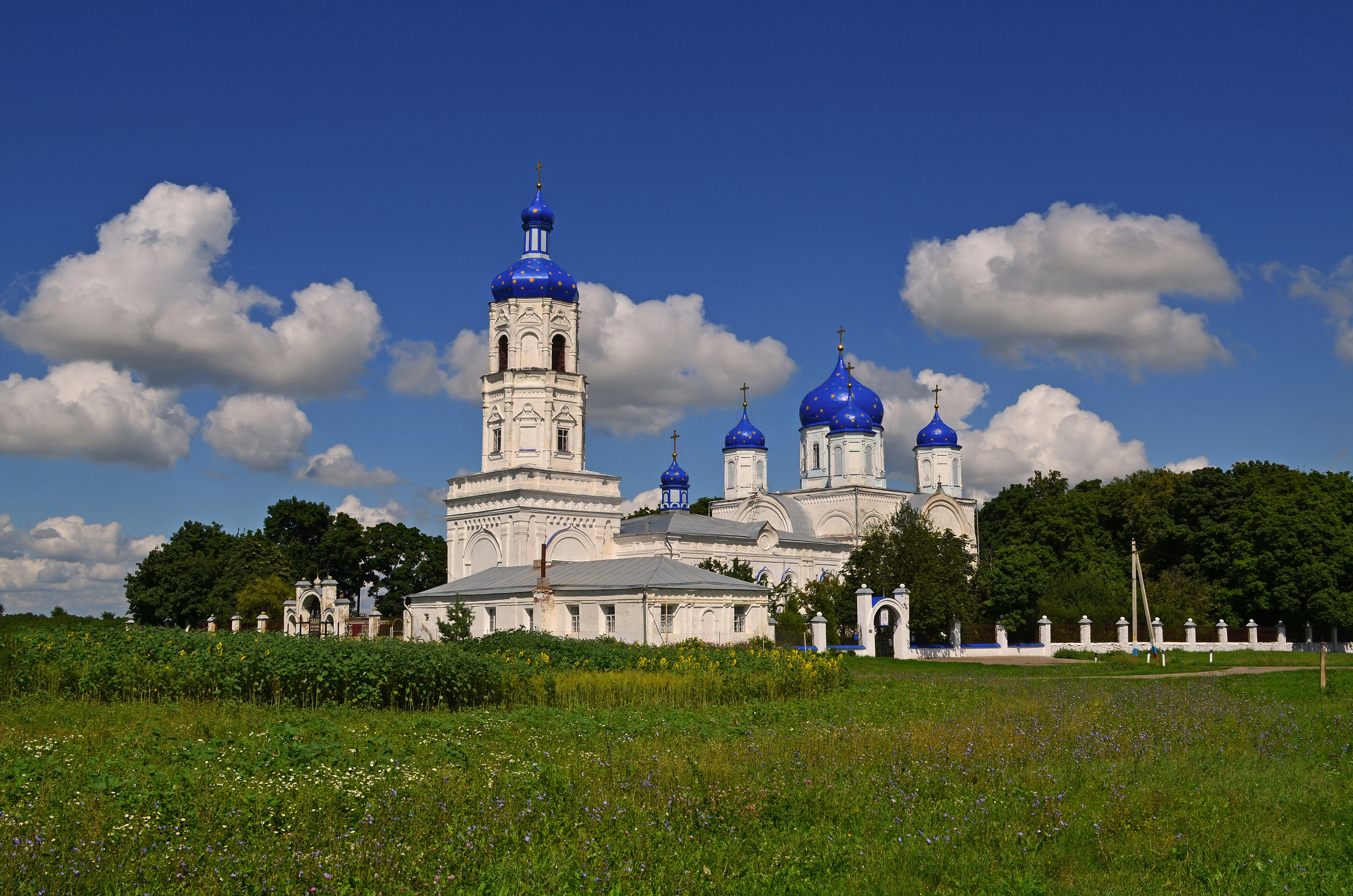 Церковь Боголюбской иконы Божией Матери в селе Зимарово Рязанской области.